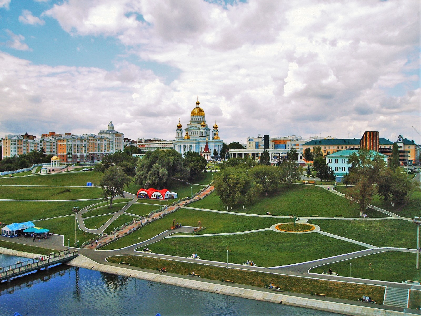 Вид на центральную часть Саранска с атракциона «чёртово колесо» в Парке имени Пушкина. В центре фото — Собор Святого Праведного Воина Федора Ушакова.